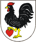 znak obce